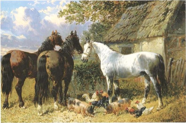 John Frederick Herring Jr. (1820-1907): Farmyard Feast, Ueleg op Kartong Original: 16,5 x 25,4 cm